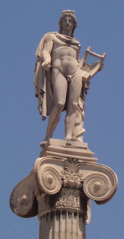 Apolo en la columna, Academia Moderna de Atenas. Sobre un trabajo original del usuario Lufke (se ha recortado la imágen por error y se subió nuevamente la original)